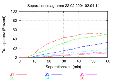 Separationsdiagramm Disperse Separation